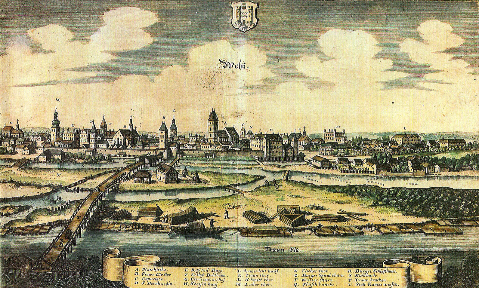 Mittelalterliche Stadtansicht von Wels